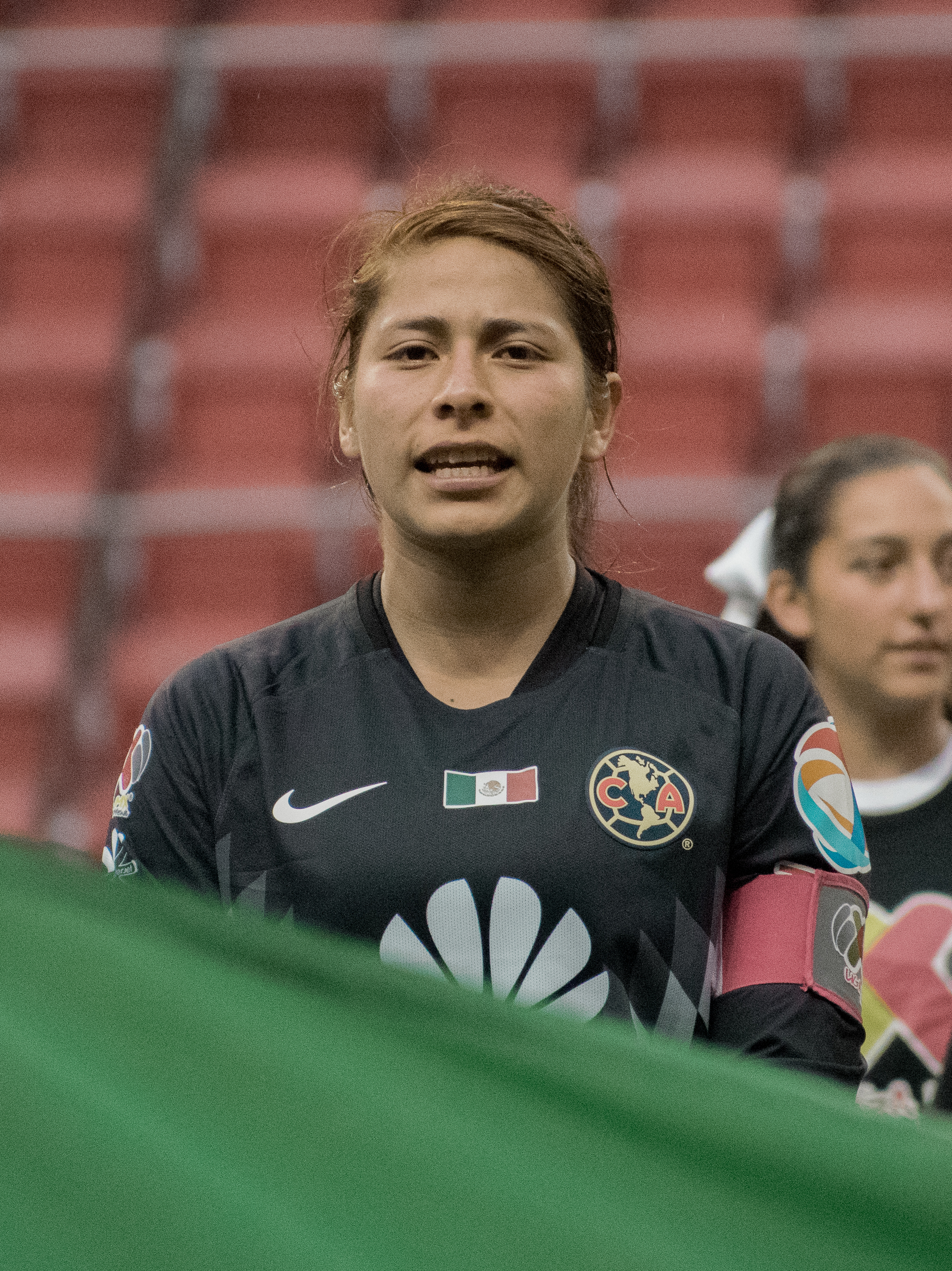 Cecilia Santiago, jugadora de futbol mexicana.